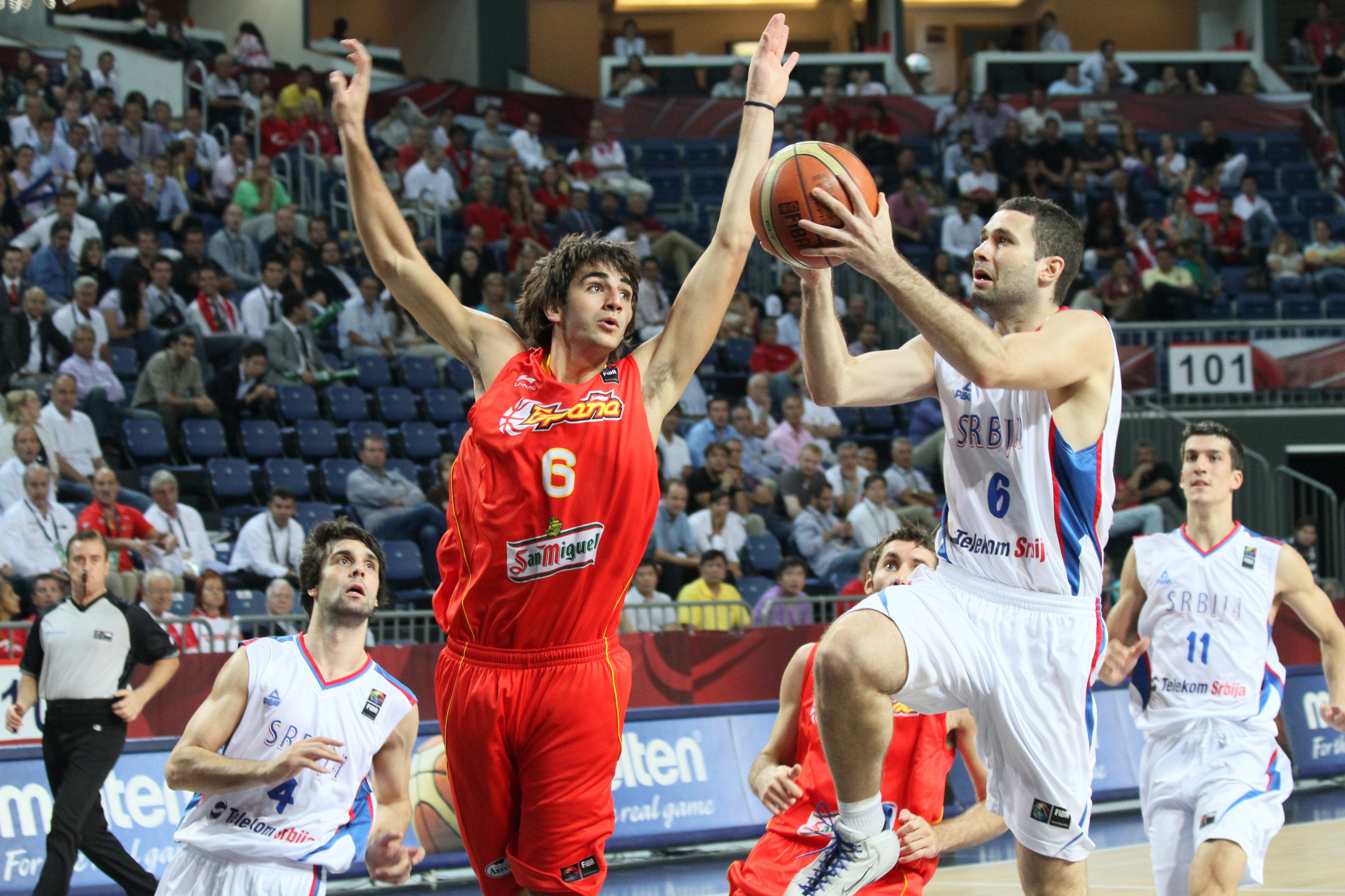 Rašić lays up